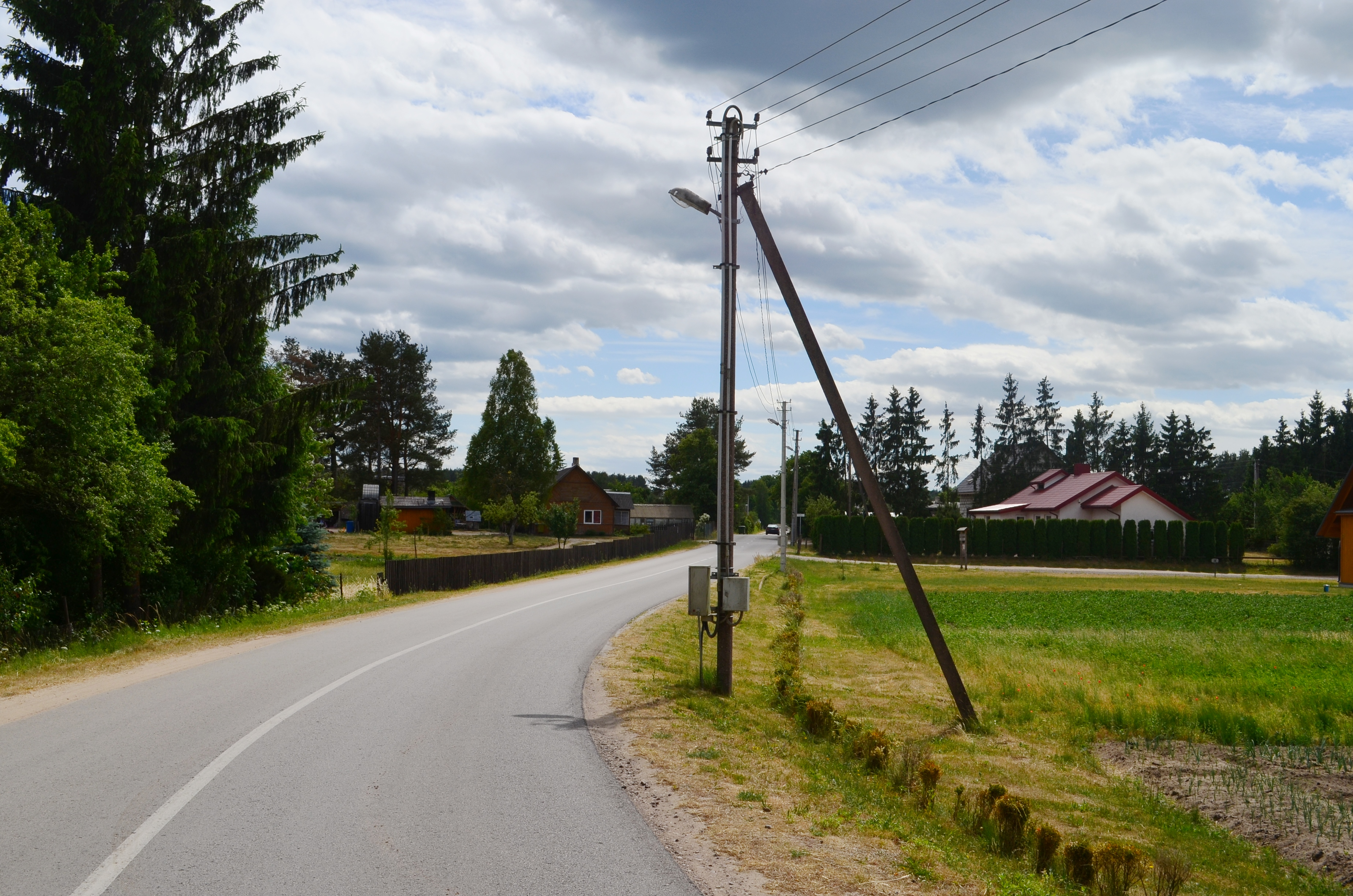 Jaskonys, Druskininkų sav.